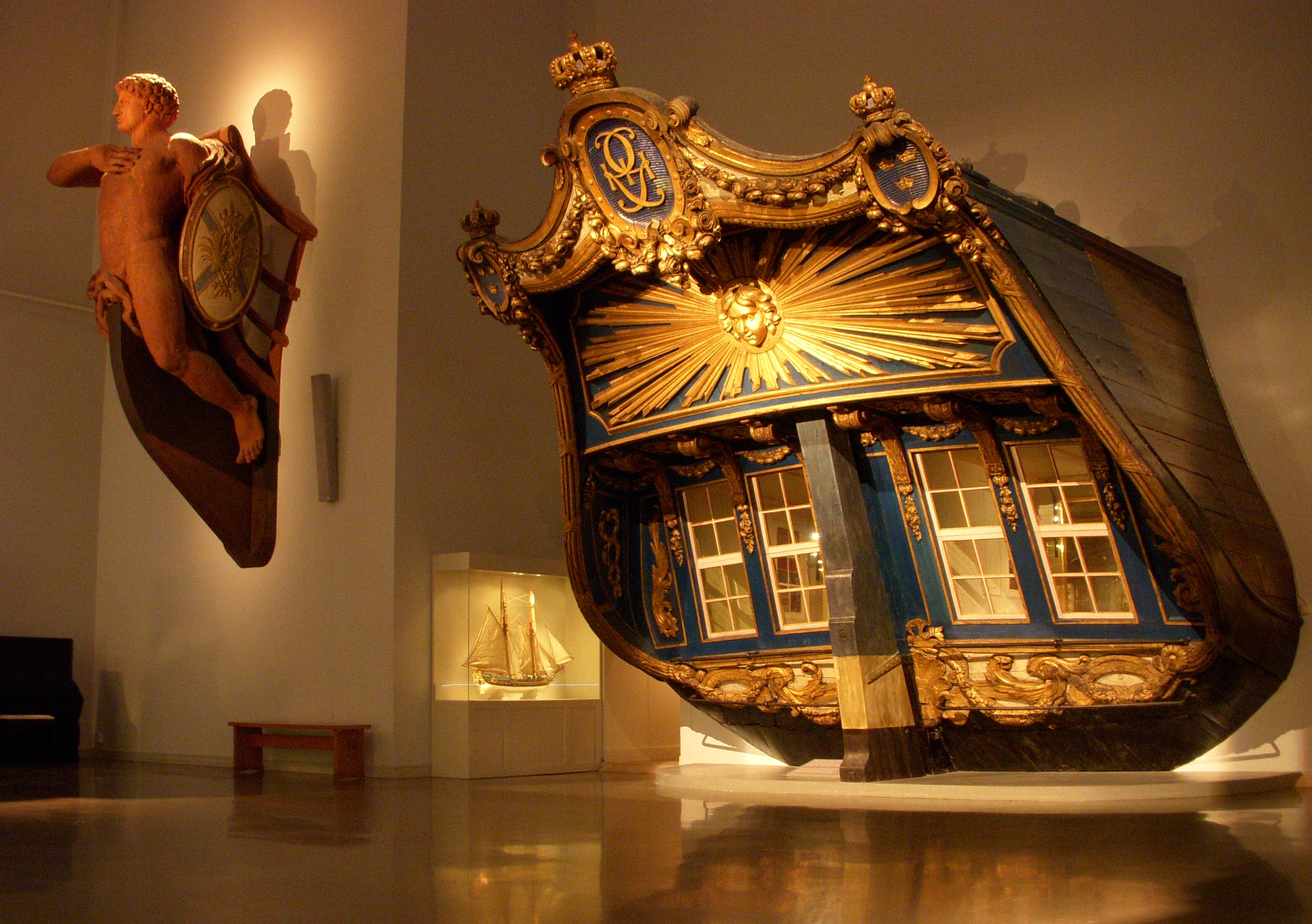 Sjöhistoriska museet i Stockholm, den bevarade akterspegeln från Gustav III:s lust- och stabsfartyg Amphion.